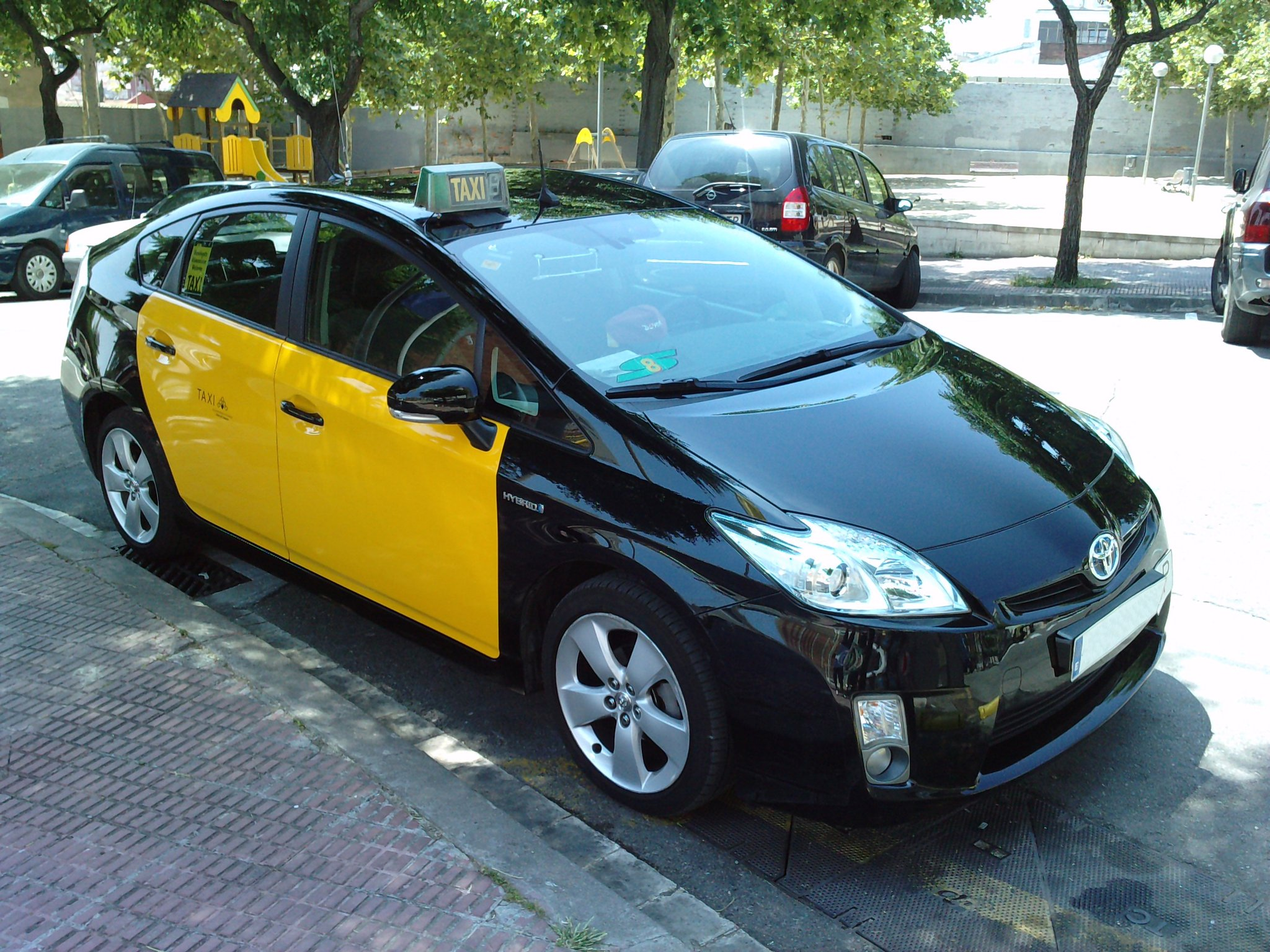 Toyota Prius 3G Taxi Barcelona